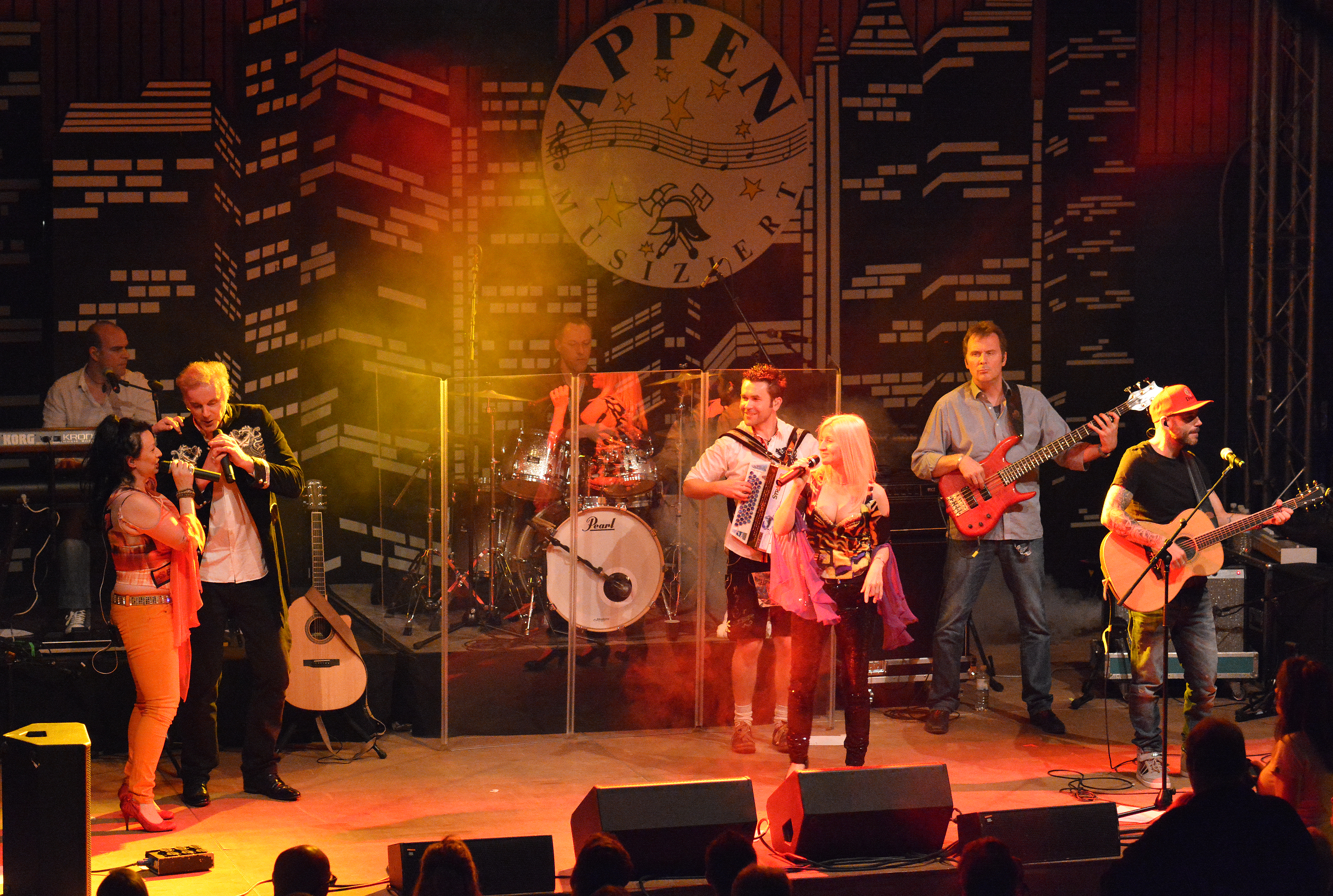 Die Seer bei Appen musiziert 2014